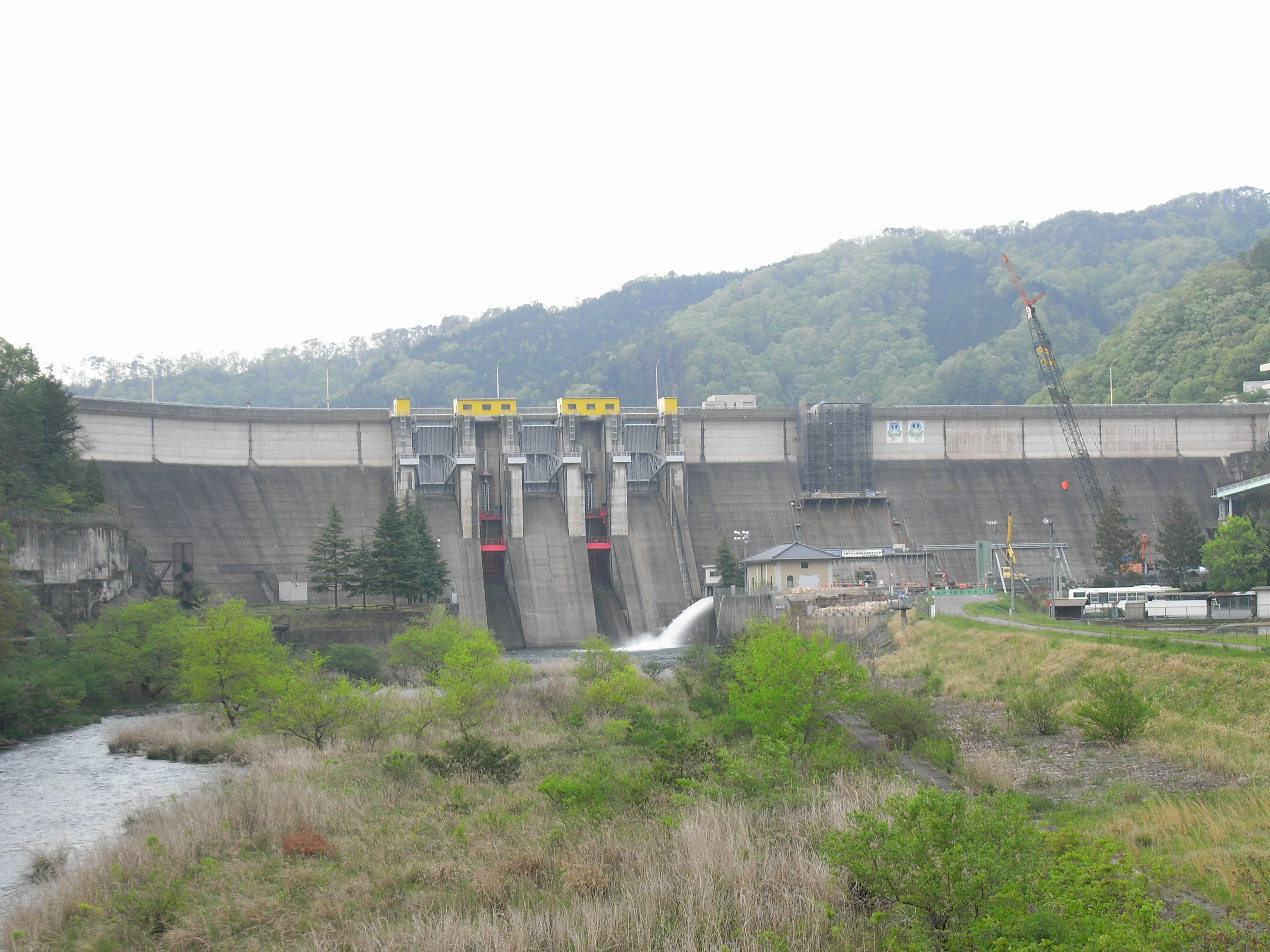 Dam